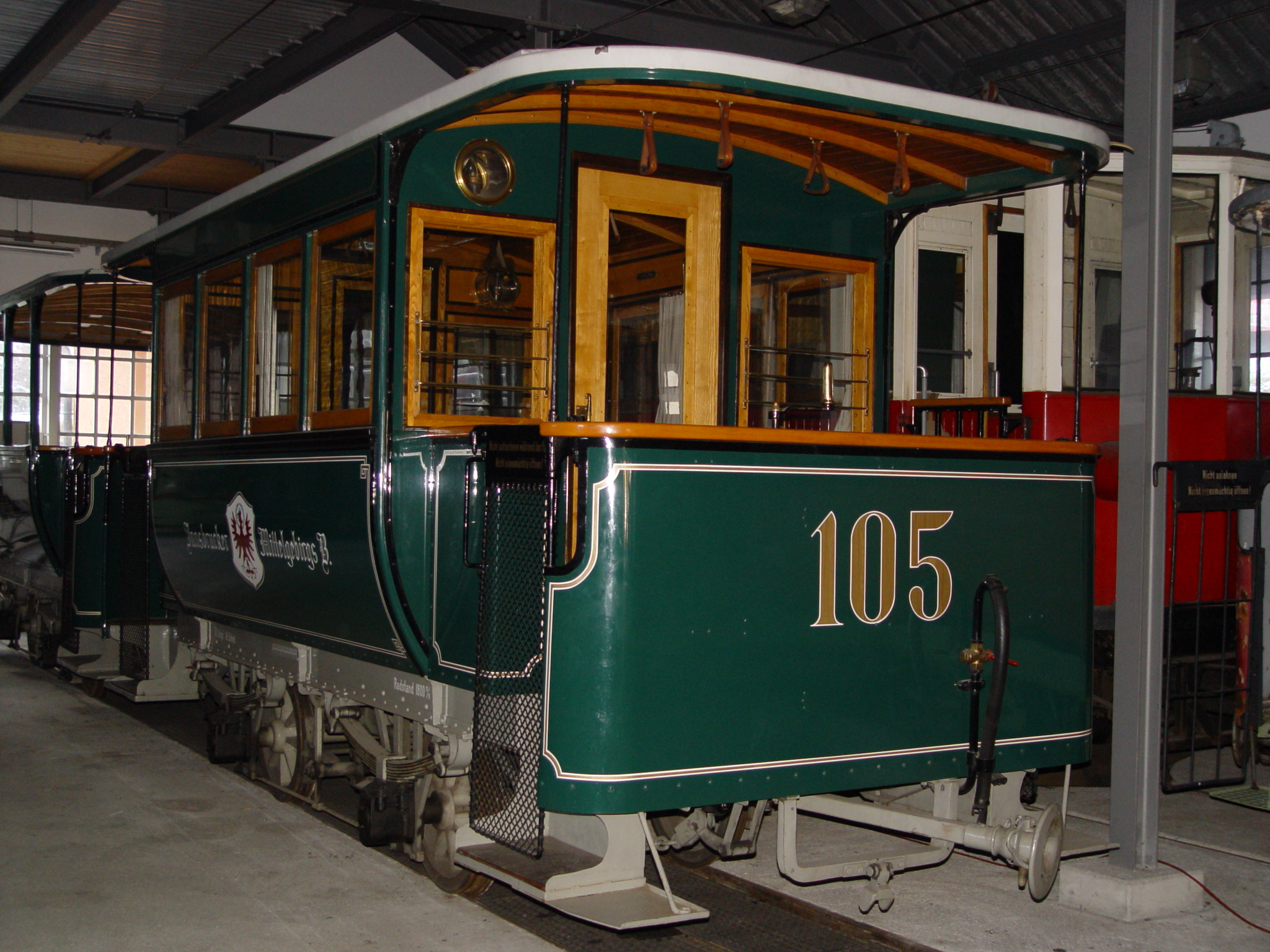 Beiwagen 105 der Innsbrucker Mittelgebirgsbahn bei den Tiroler Museumsbahnen - Zustand 1900